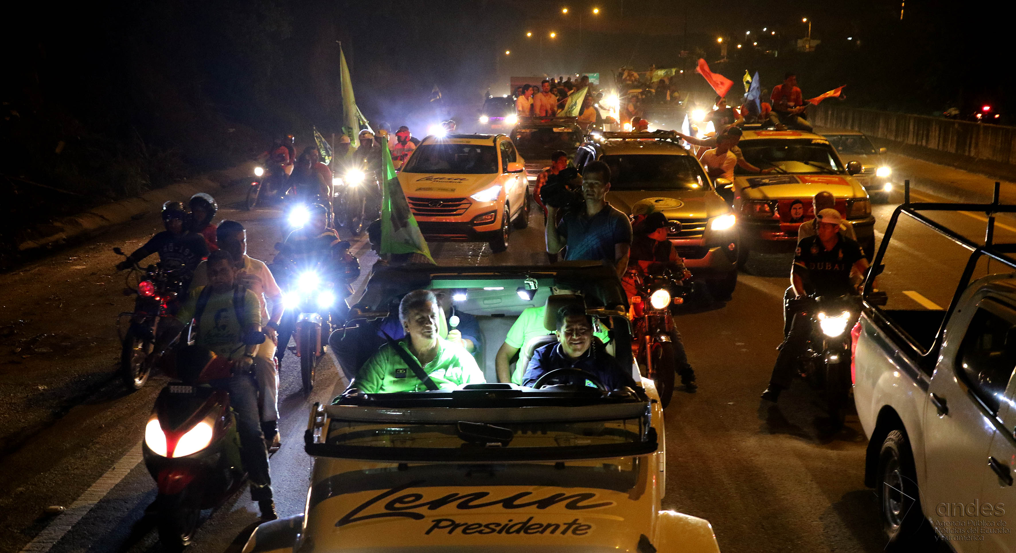 Guayaquil, lunes 27 de marzo del 2017 (Andes).-En una caravana motorizada el candidato presidencial Lenin Moreno recorrio los distritos 1,2 y 3 de Guayaquil. Foto:Andes/César Muñoz